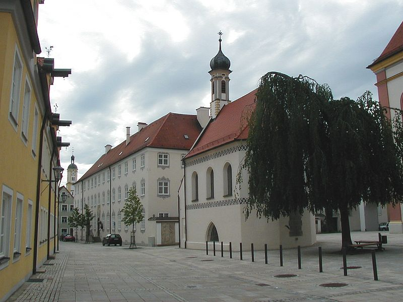 Gruftkapelle Maria Schnee u. St. Michael in Mindelheim